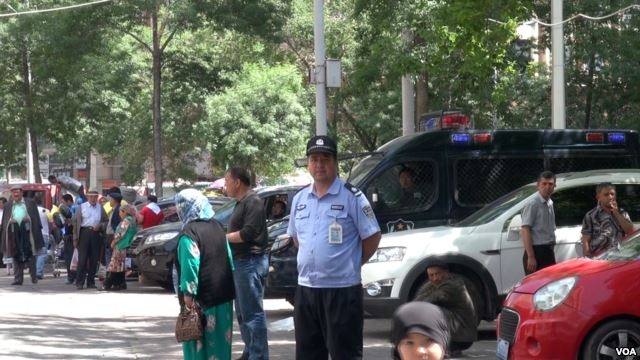 在一連串襲擊事件後，中共在新疆加強戒備